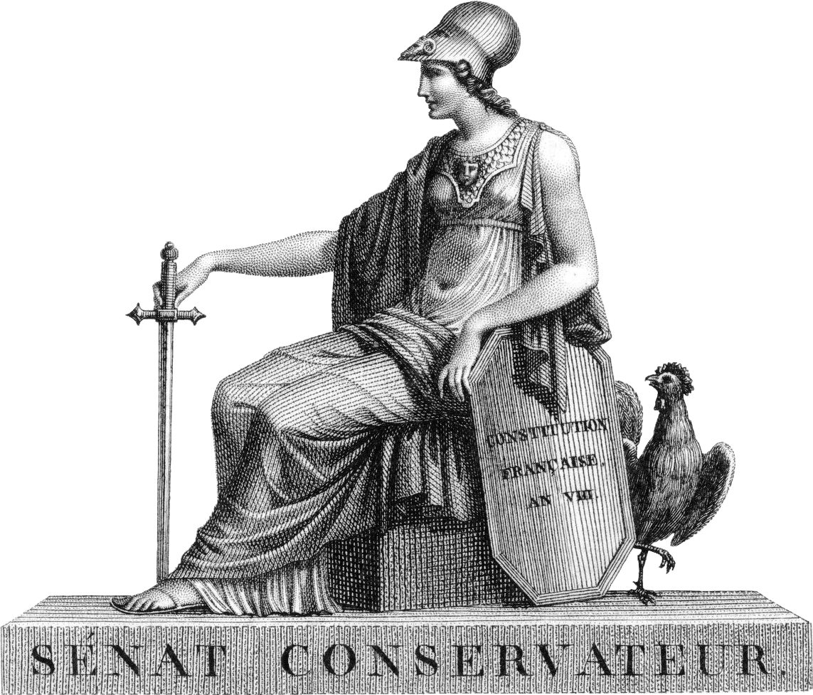 En-tête de page - Sénat conservateur - Estampe